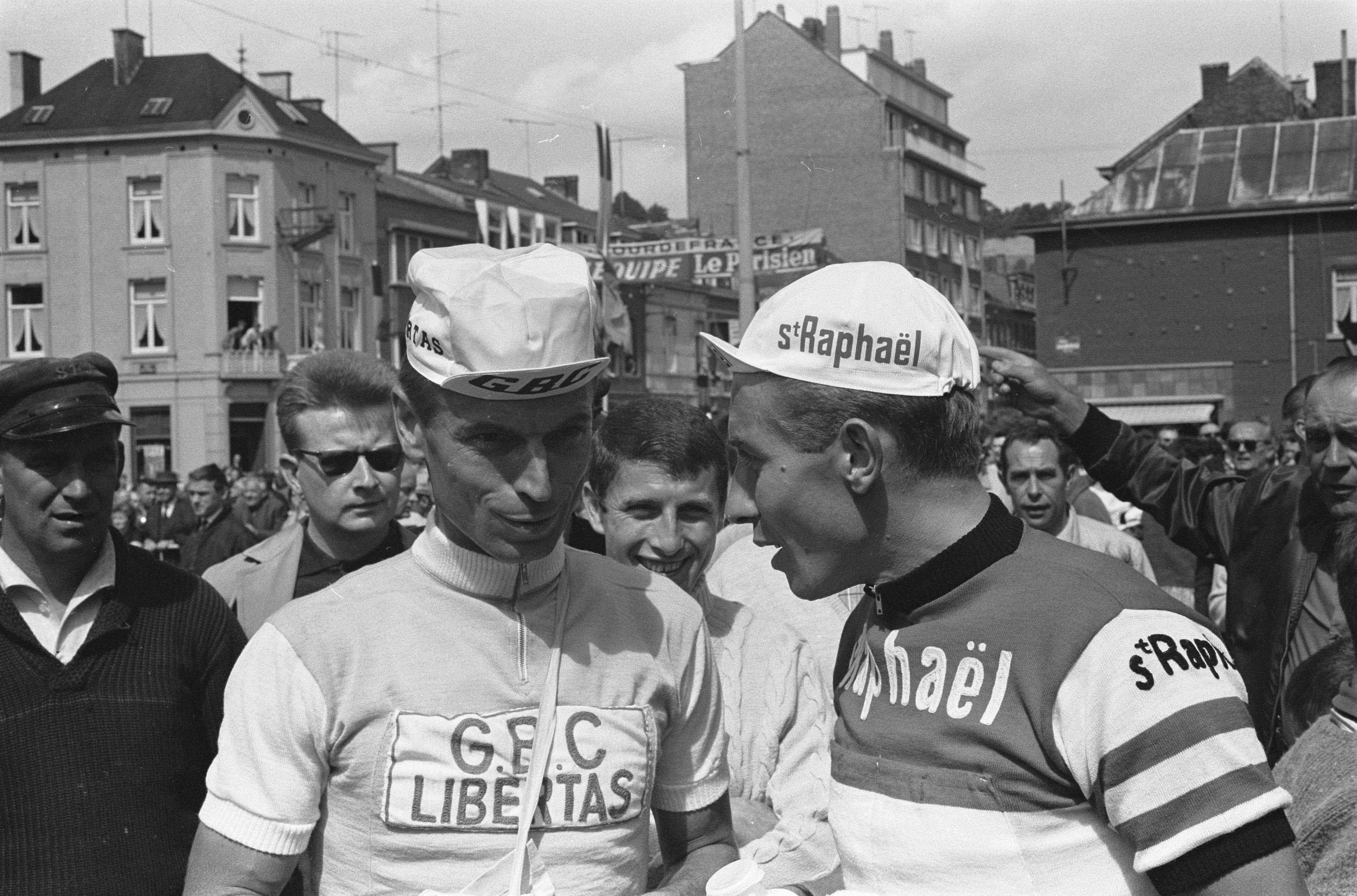 Collectie / Archief : Fotocollectie Anefo Reportage / Serie : Tour de France 1963 Beschrijving : Tour de France bij de start. Anquetil (rechts) en Rik van Looy Datum : 27 juni 1963 Trefwoorden : sport, wielrennen, wielrenners Persoonsnaam : Anquetil, Jacques, Looy, Rik van Fotograaf : Fotograaf Onbekend / Anefo Auteursrechthebbende : Nationaal Archief Materiaalsoort : Negatief (zwart/wit) Nummer archiefinventaris : bekijk toegang 2.24.01.05 Bestanddeelnummer : 915-3093